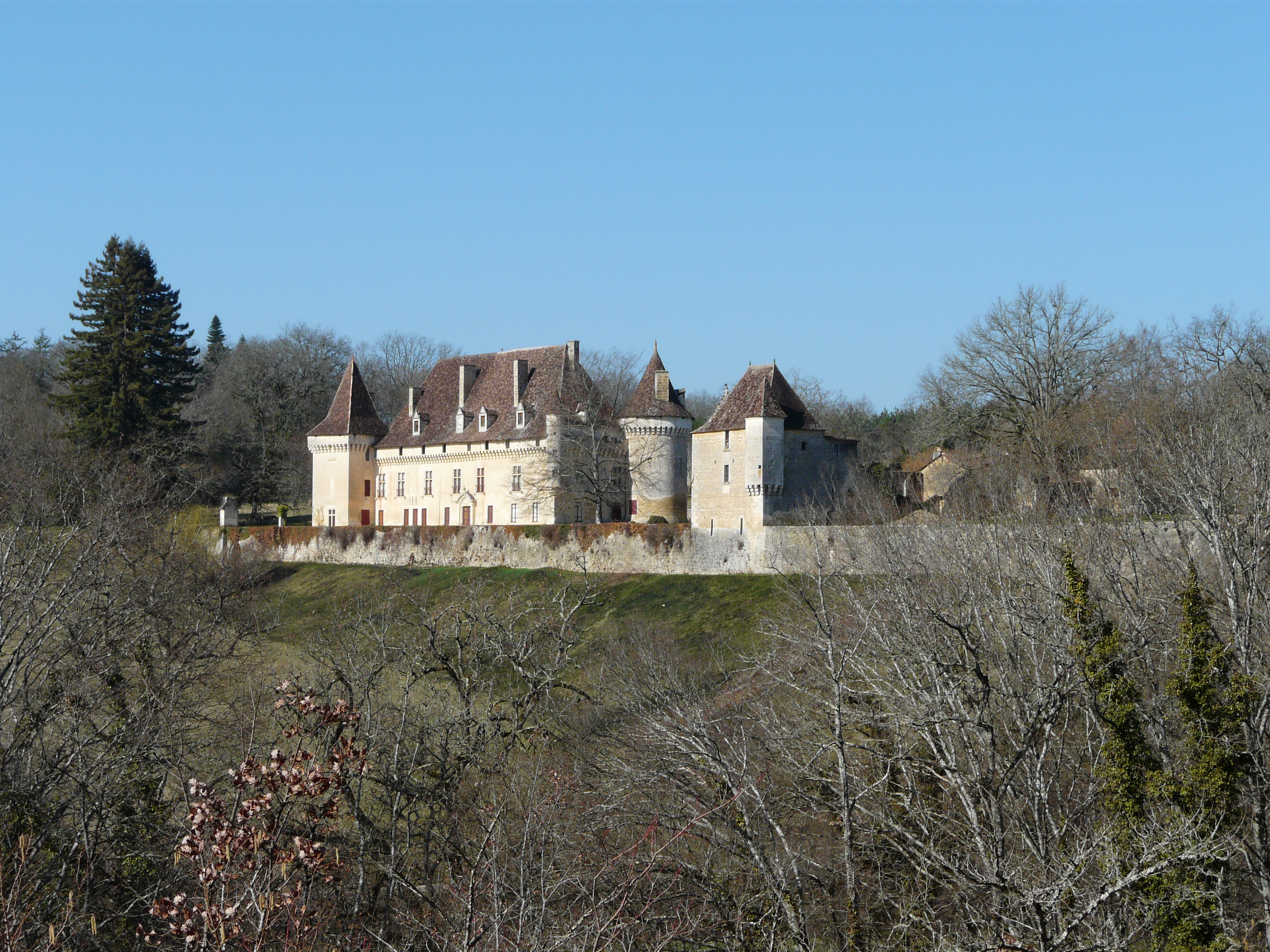 Le château de la Gaubertie vu depuis l'est, Saint-Martin-des-Combes, Dordogne, France.